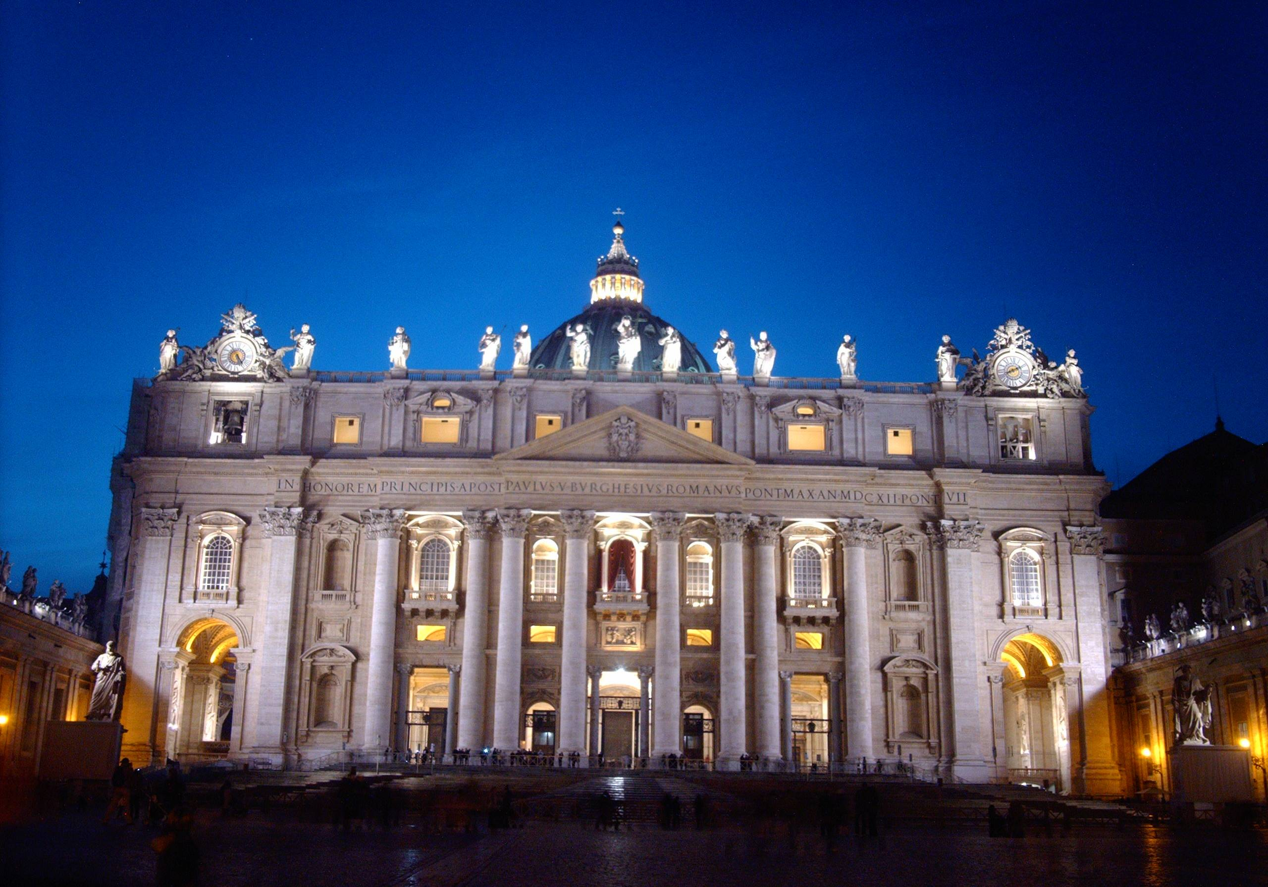 Petersdom bei Nacht